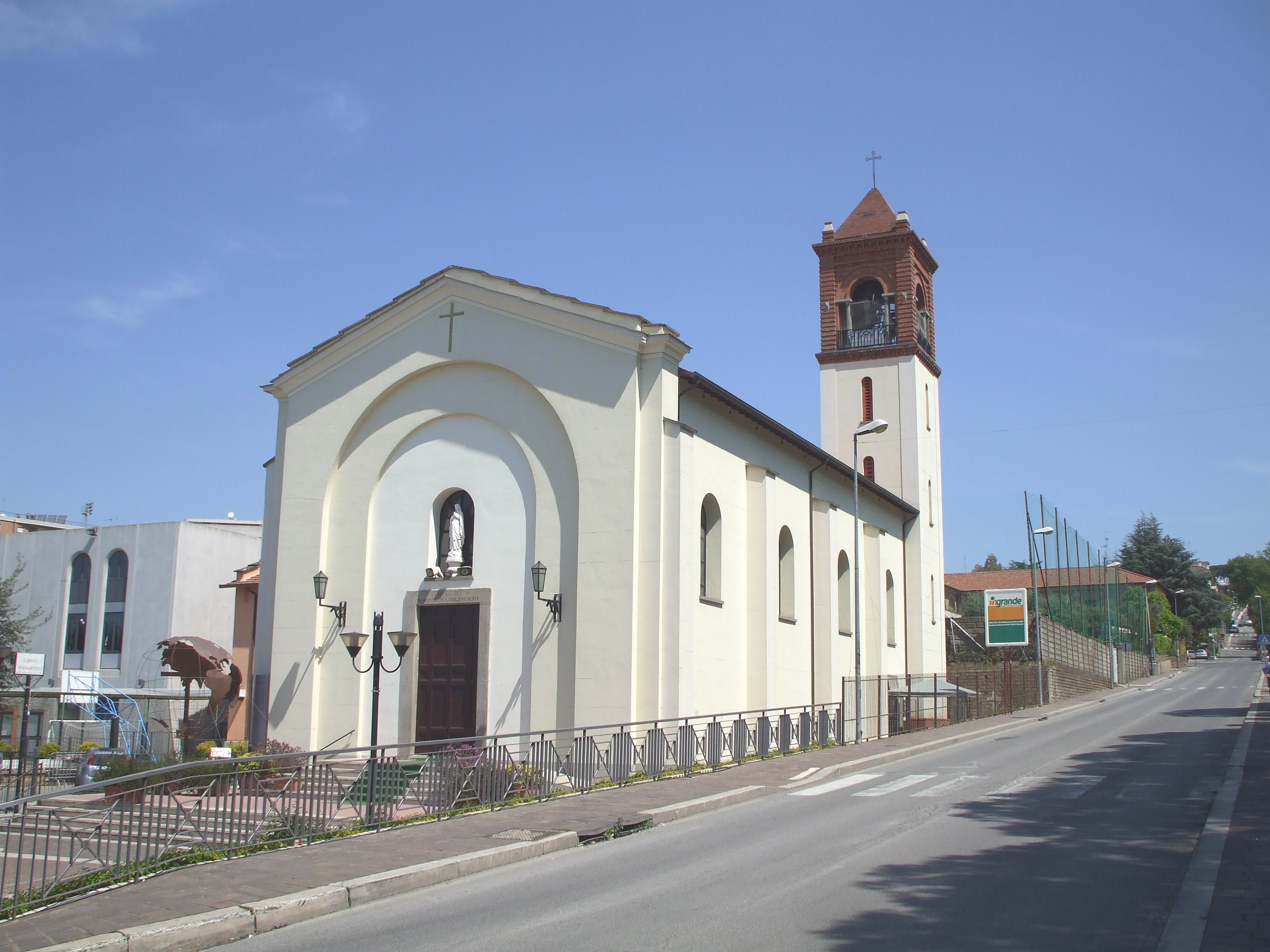 == Licenza d'uso ==